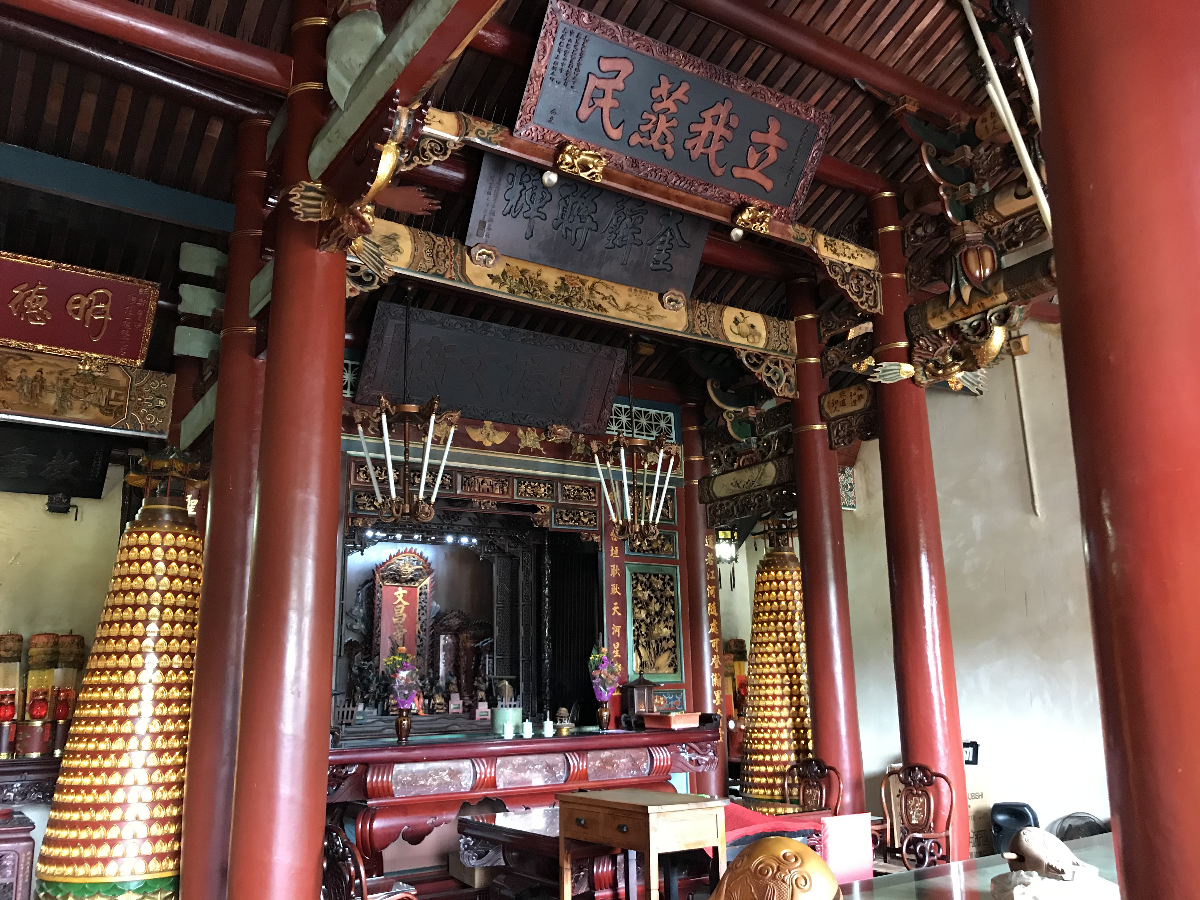 中文（台灣）: 明新書院「立我蒸民」匾與牌位